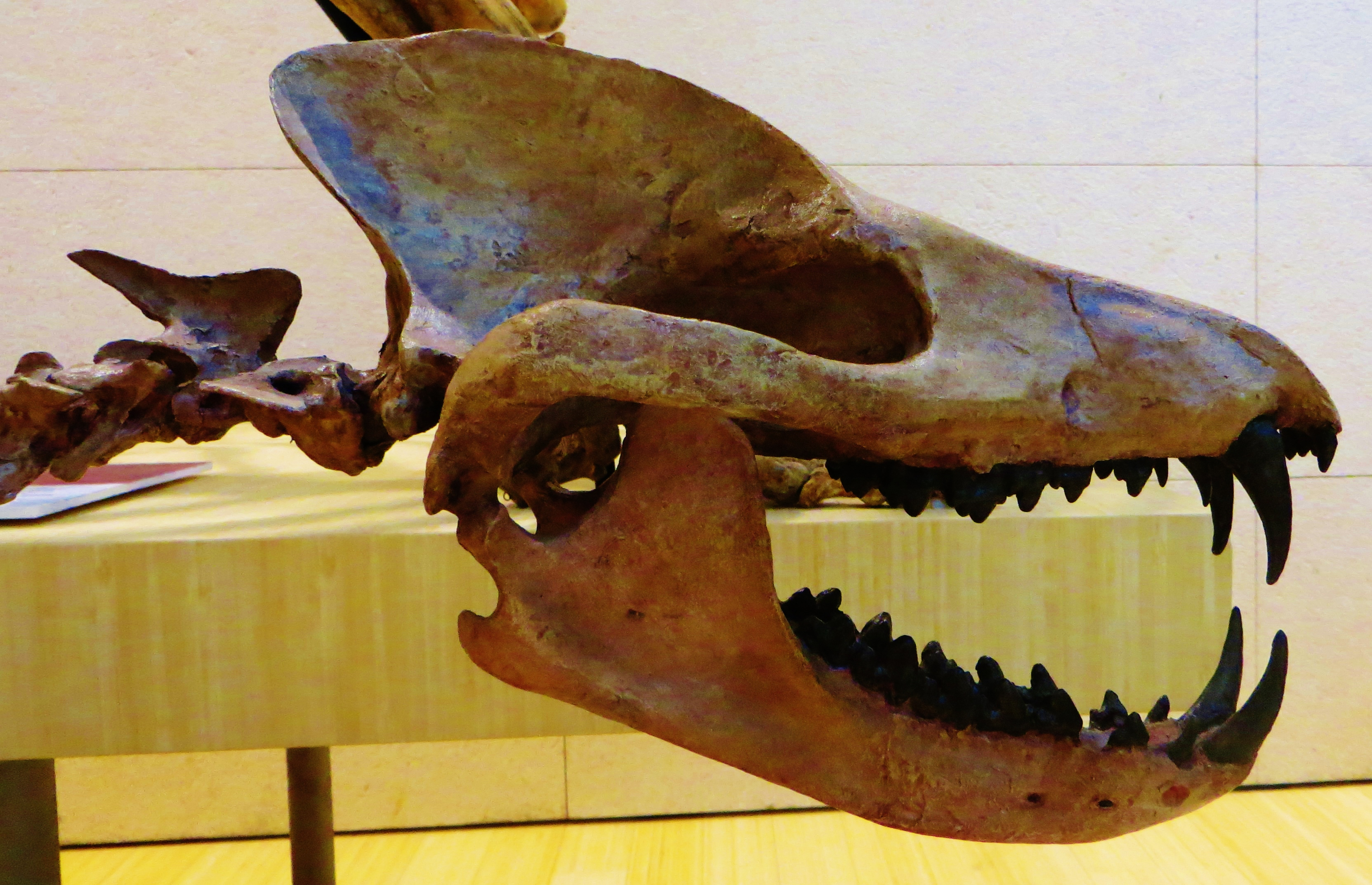 Fossil of Sinonyx, an extinct mammal- Took the picture at Muse (Trento)